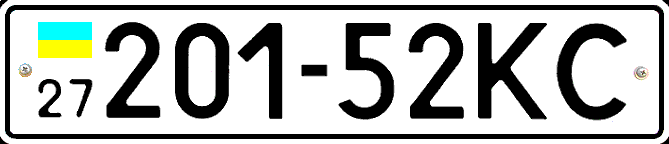 Автомобильный номер Украины, 1995-2004 годы